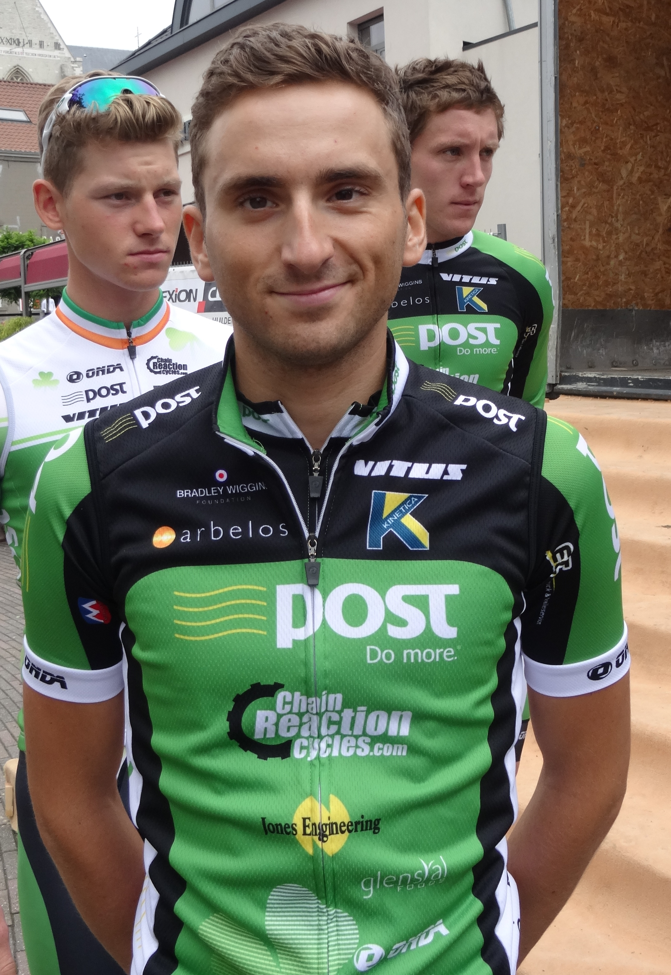 Reportage photographique réalisé le mercredi 27 août à l'occasion du départ de la Druivenkoers Overijse 2014 à Huldenberg, Belgique.